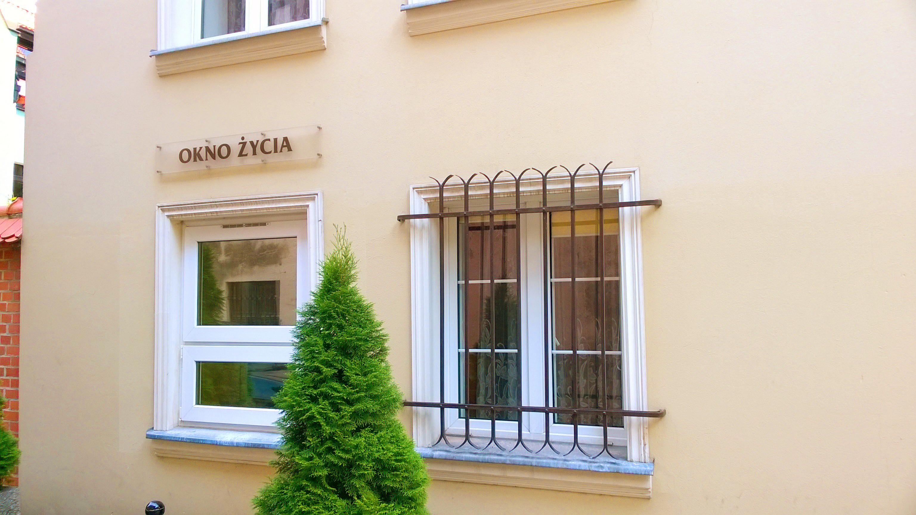 Okno Życia w Toruniu